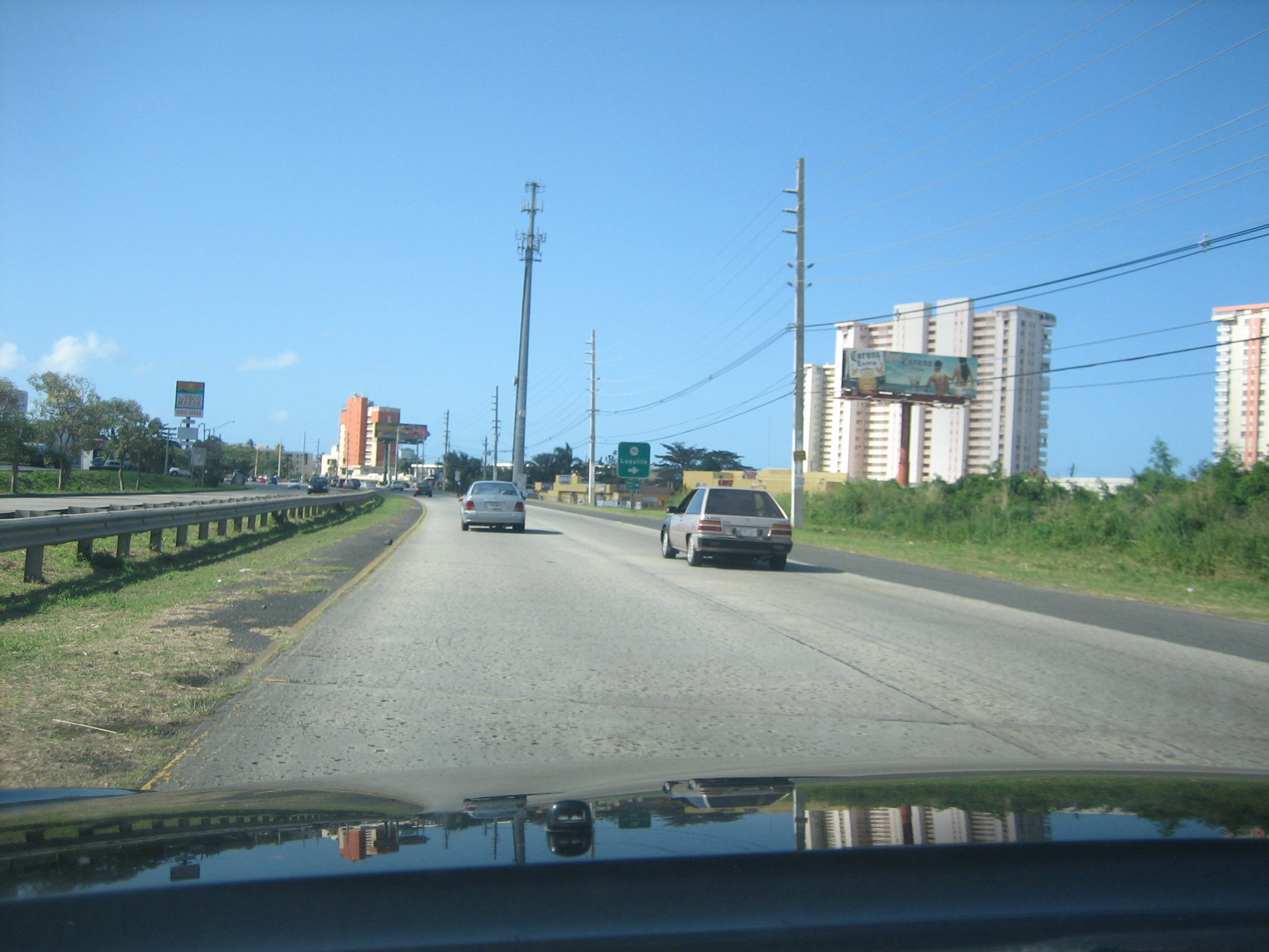 Carretera 3 Luquillo